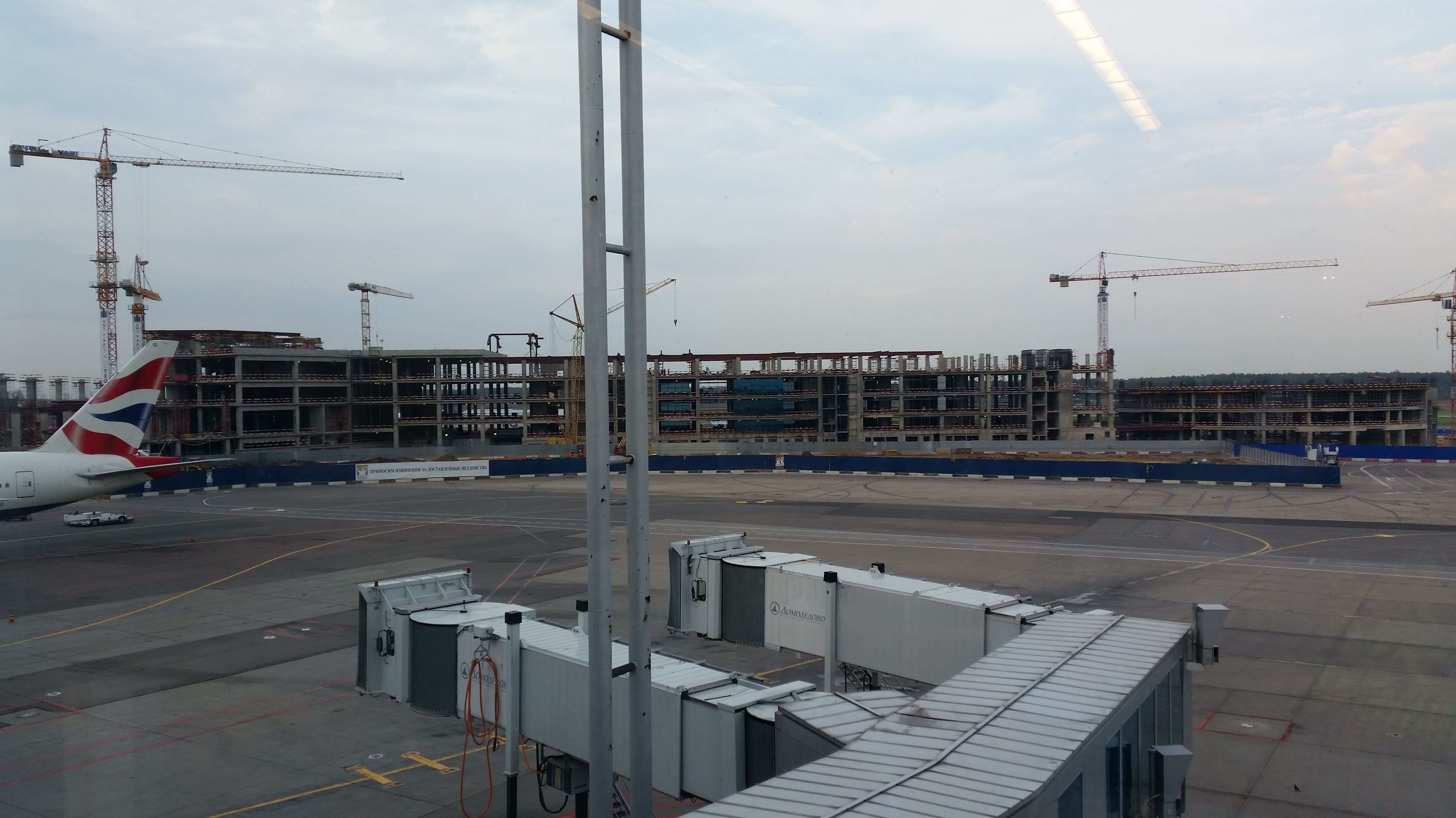 Строительство терминала Т3 в аэропорту Домодедово (сентябрь 2016)